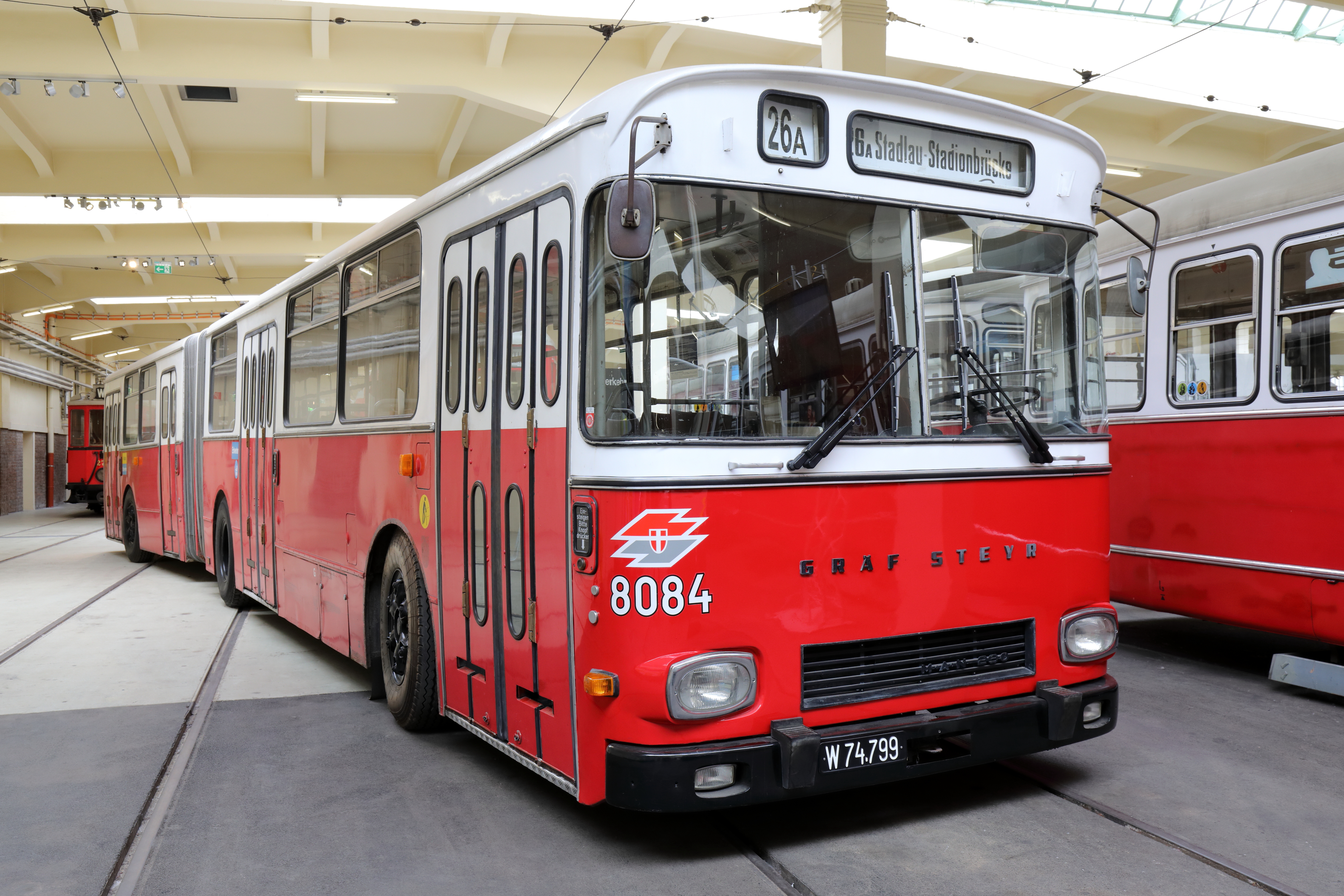 Der Gelenkbus Nr. 8084 der Wiener Linien im Verkehrsmuseum Remise im 3. Wiener Gemeindebezirk Landstraße.Der Bus (Typ: GU230/54/59/3) wurde 1974/75 von ÖAF-Gräf & Stift gefertigt. Er hat 33 Sitz- und 122 Stehplätz, wird von einem 169 kW-Motor angetrieben, hat eine Länge von 16,6 m und ein Gewicht von 12,6 Tonnen. Dieser Bus war am 1. August 1976 um 4:53 morgens auf der Reichsbrücke unterwegs, als diese einstürzte. Der Bus wurde mit einem Schwimmkran geborgen, instandgesetzt und versah danach wieder regulär den Liniendienst bis zur Außerdienststellung 1989.